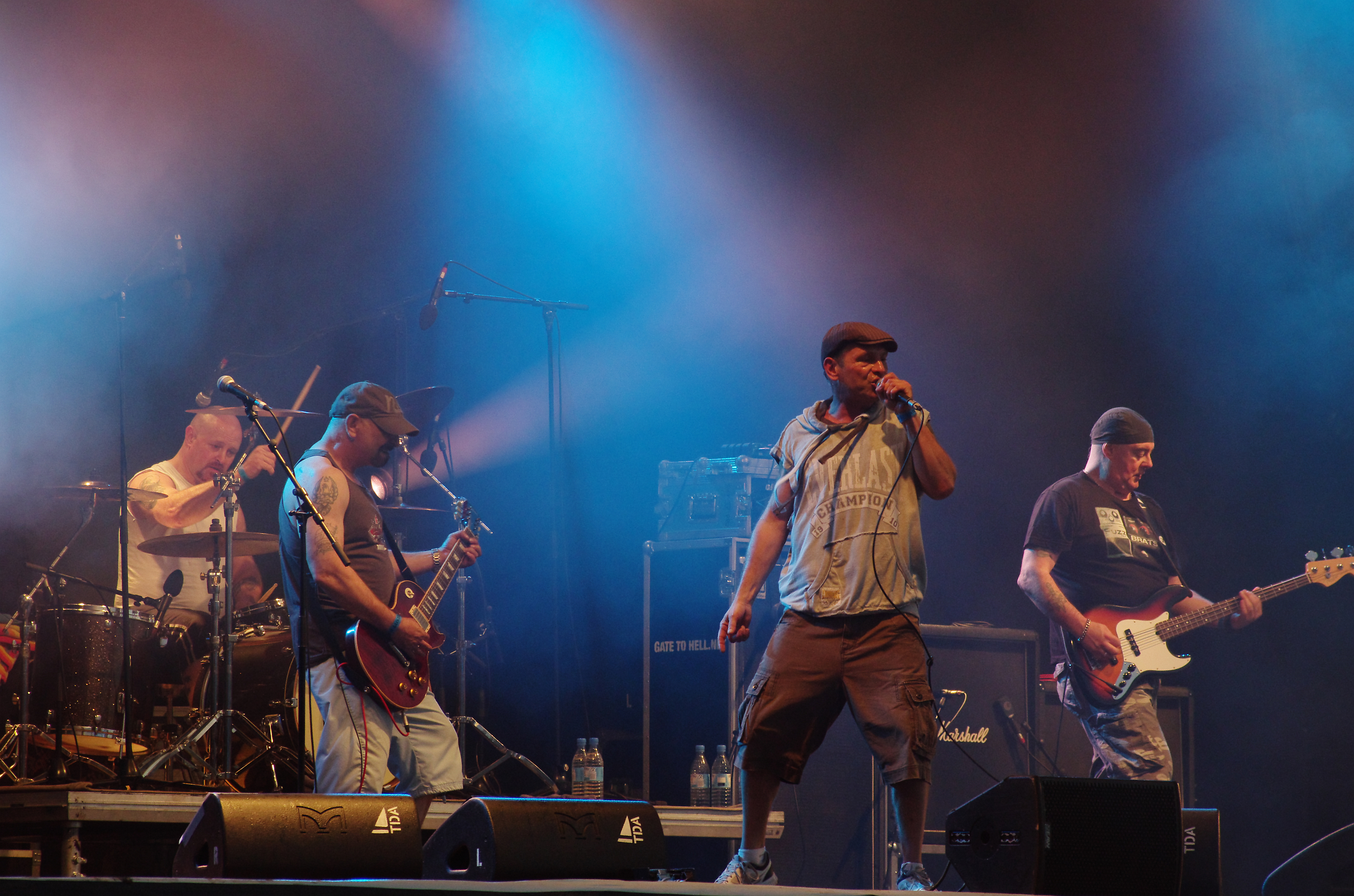 Cockney Rejects beim Ruhrpott Rodeo 2013 in Hünxe.